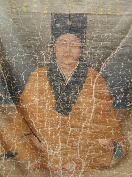 Chân-dung Tể-tướng Nguyễn-quán-Nho.